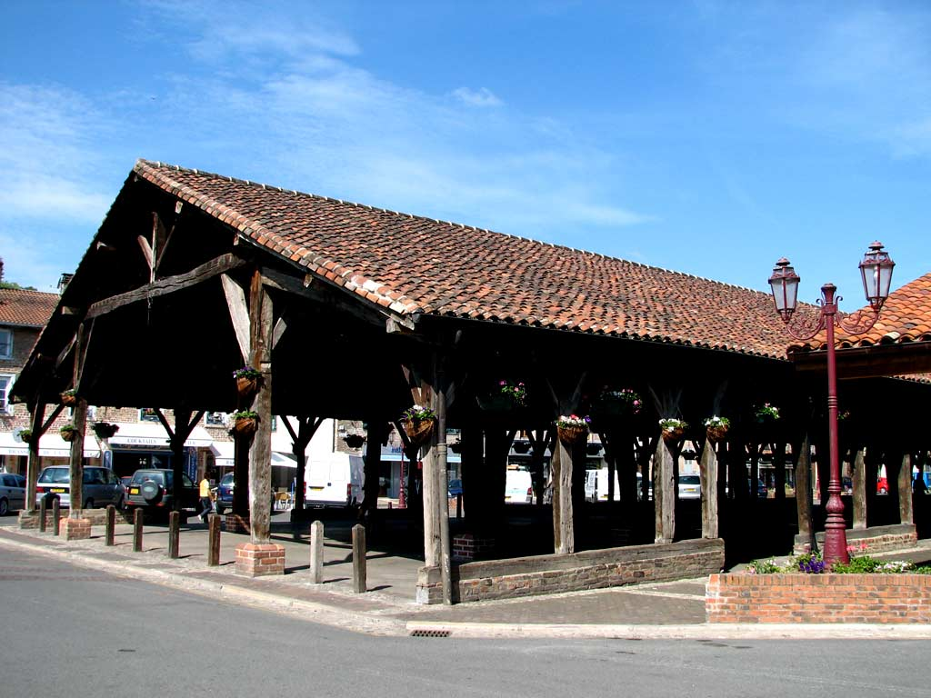 Châtillon-sur-Chalaronne, halles historiques